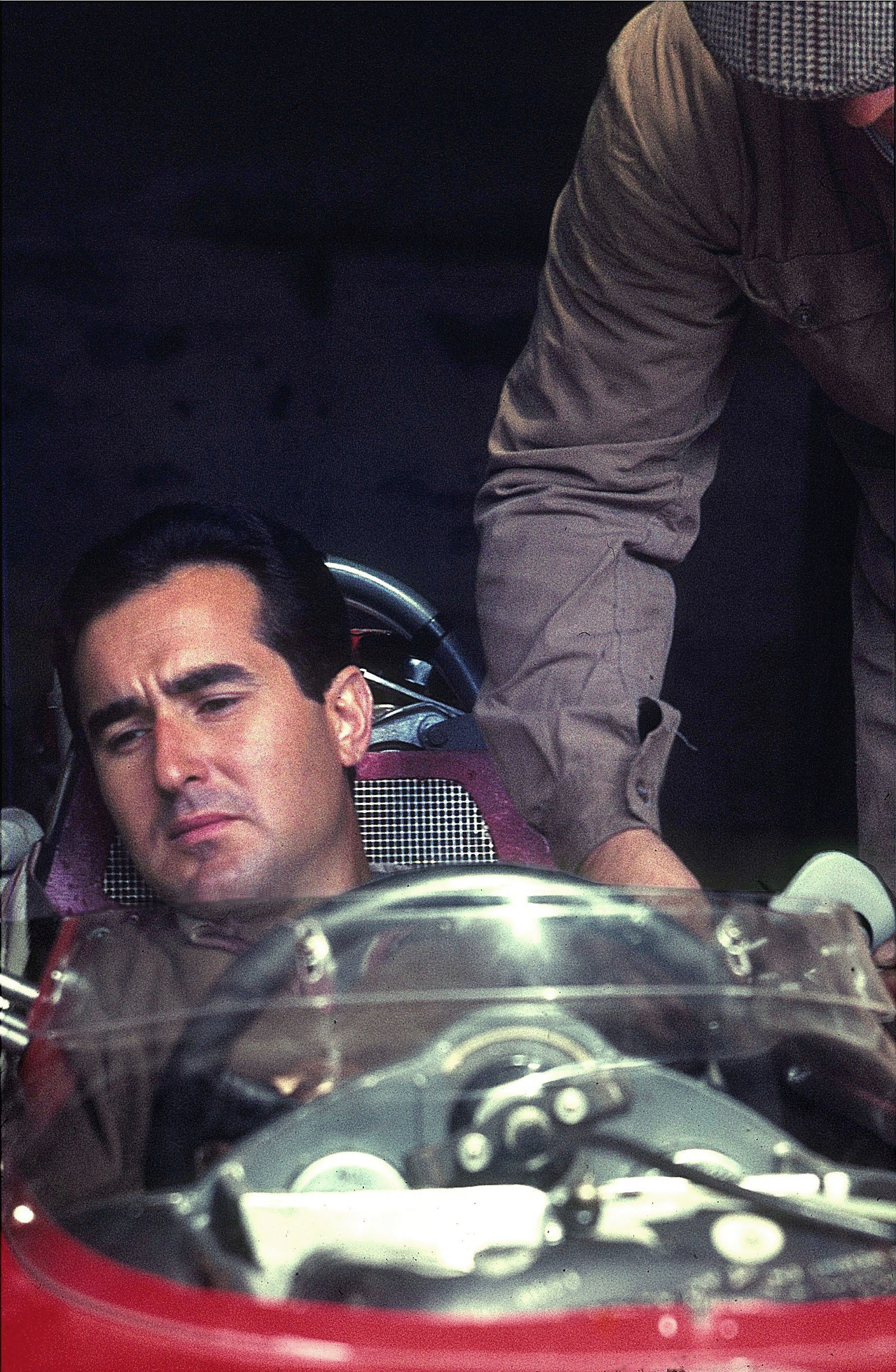 Lorenzo Bandini 1966 im Fahrerlager des Nürburgrings